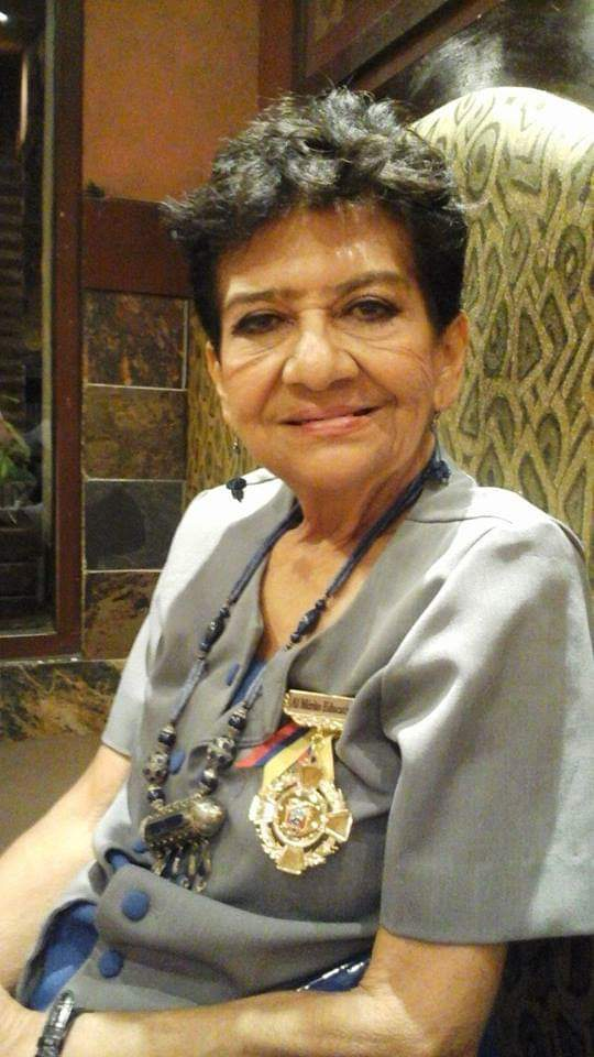 Elina Manzano de Félix con la Condecoración Doctora Matilde Hidalgo de Prócel